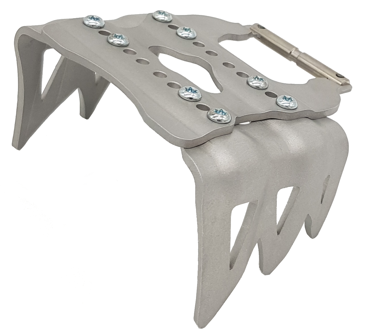 Dispositivo denominato "rampant" da agganciare agli attacchi da scialpinismo in condizioni di neve ghiacciata durante la salita, per evitare rischi di scivolamento.